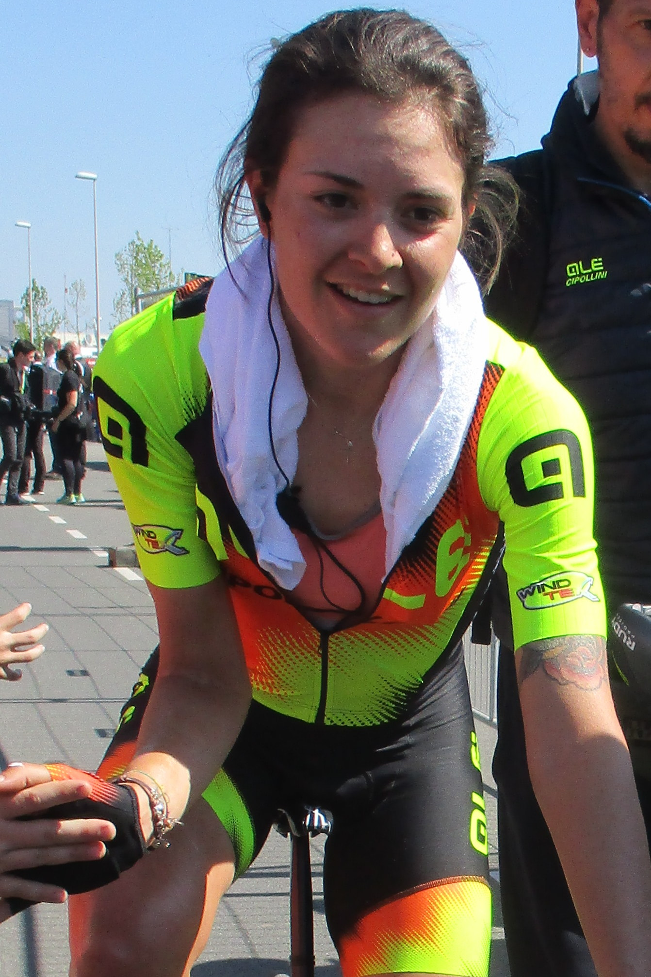 Finish van de Amstel Gold Race Ladies Edition 2019